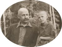 М.Н. Полоз (1891-1937) с дочерью Радой. 1933.